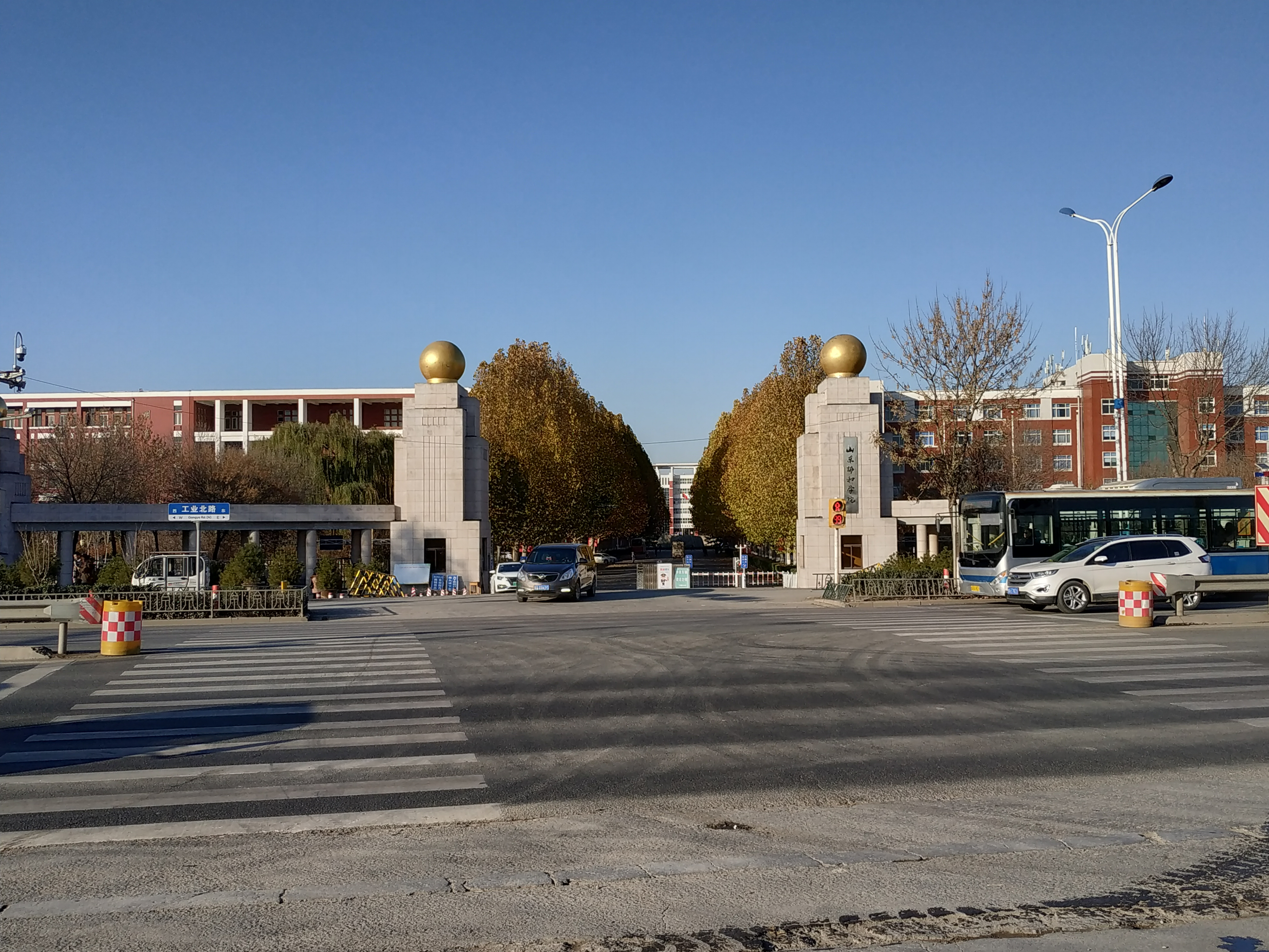 中文（中国大陆）: 山东协和学院室外拍照